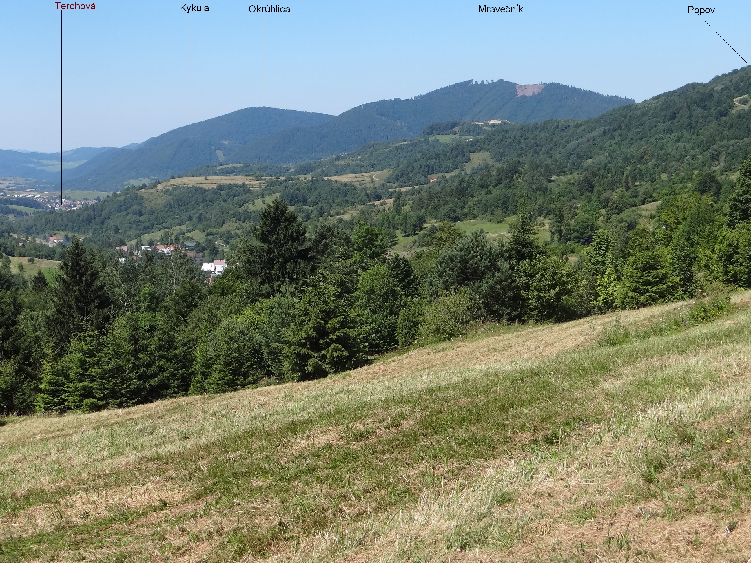 Kysucká vrchovina, Terchová